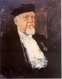 Schilderij gemaakt in 2001 door Tijn Roebroeck te Groningen. Bron: Tijn Roebroeck